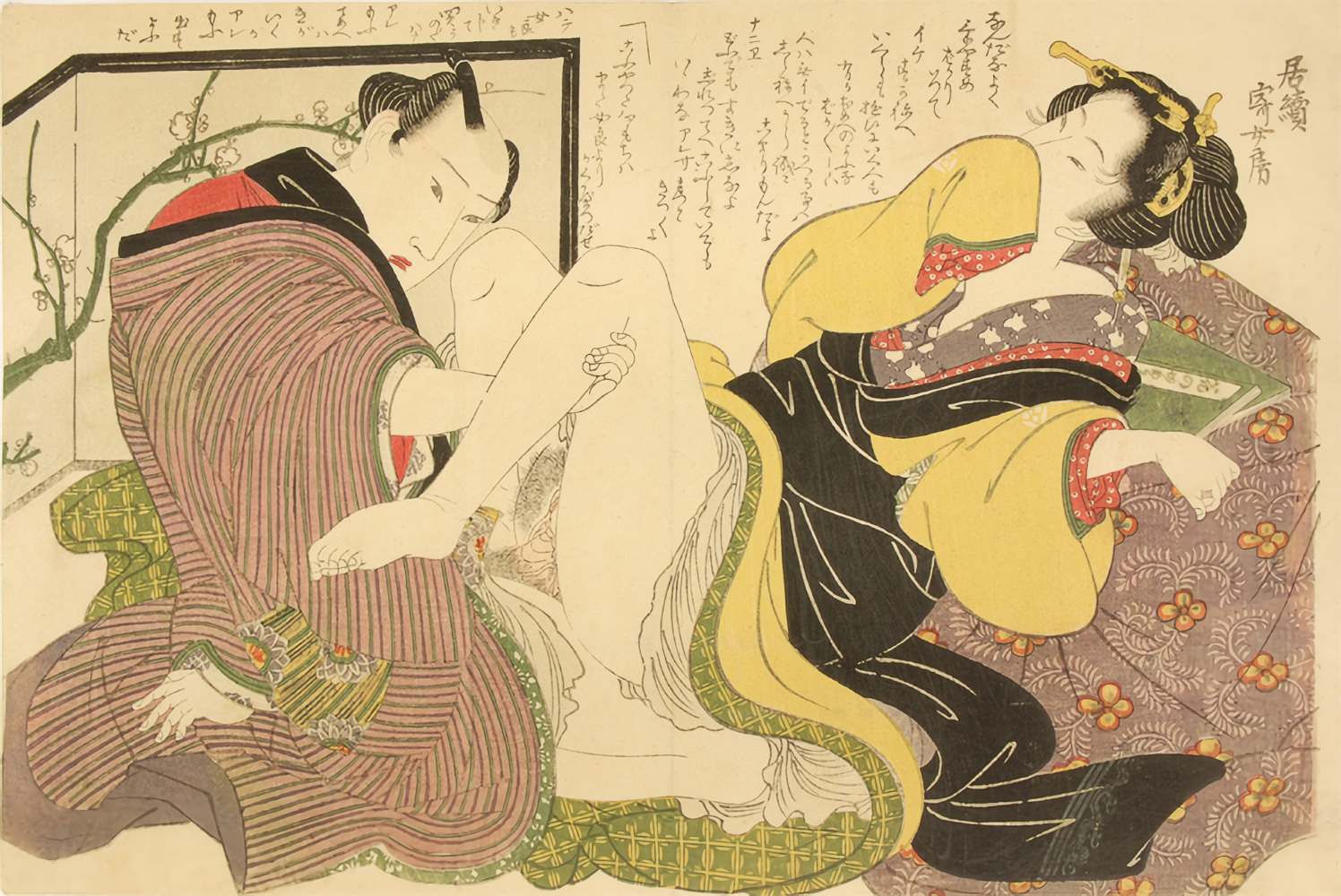 Shunga